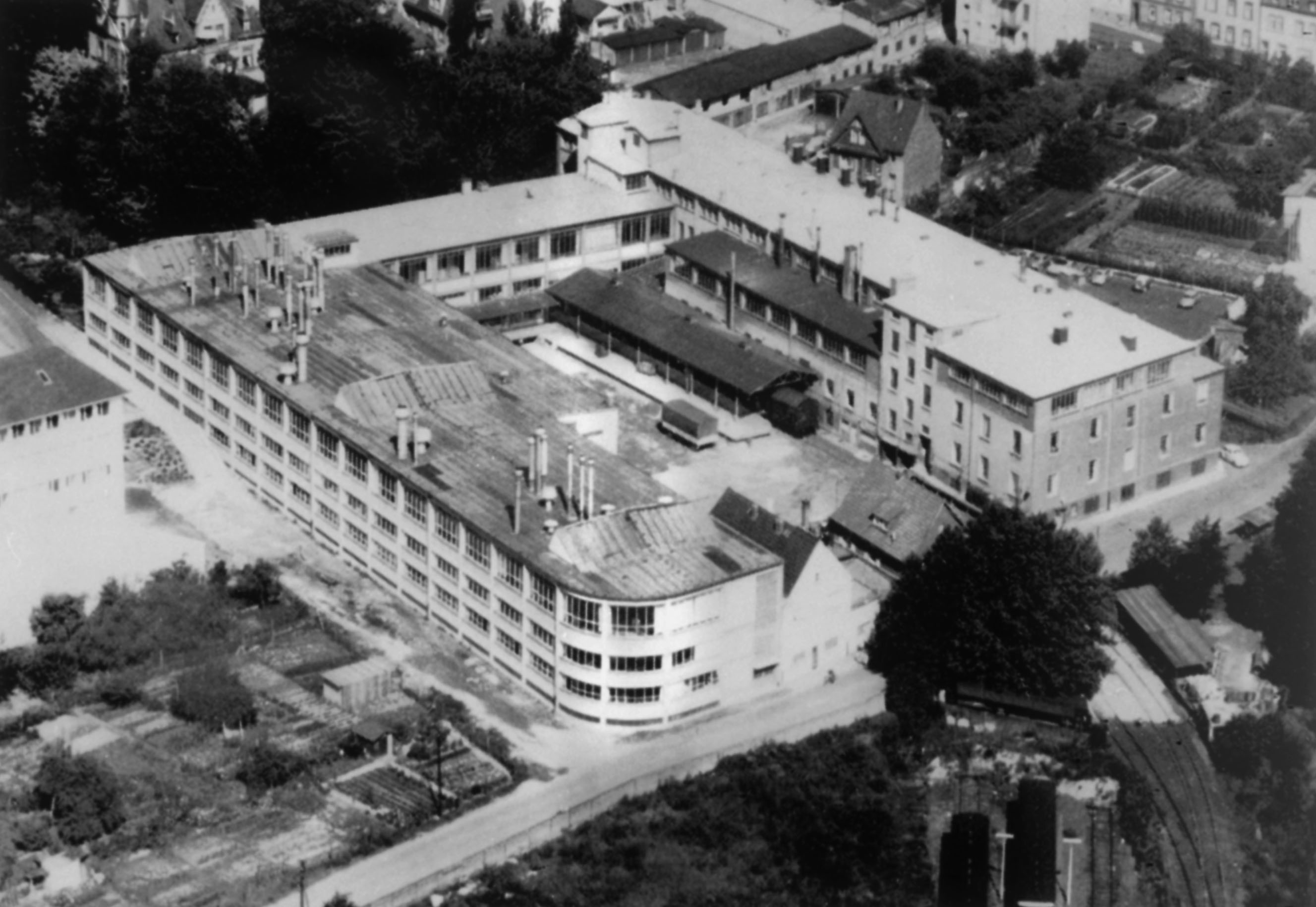 Das Gebäude der Blechwarenfabrik Limburg 1961